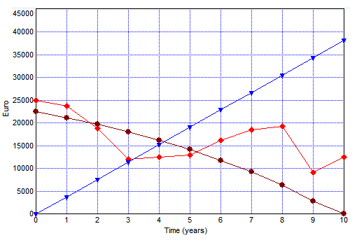 Woekerpolis laat de ontwikkeling van een zogenoemde woekerpolis zien; een 10-jaar contract van Dexia bank (Korting Koers) op basis van een AEX waarde certificaat gekocht met een gekoppelde lening in 2000. Legende: Blauw=maandelijkse inleg; Rood = waarde van de certificaat op 1 januari iedere jaar van 2000-2010; Bruin geeft aan de restant schuld van de gekoppelde lening. Duidelijk is te zien dat de inleg met zelfs nul rente nog altijd de beste optie zou zijn geweest, ook was het contract begonnen in de daaropvolgende twee jaren.